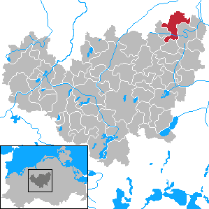 Behren-Lübchin in Mecklenburg-Vorpommern - District Güstrow